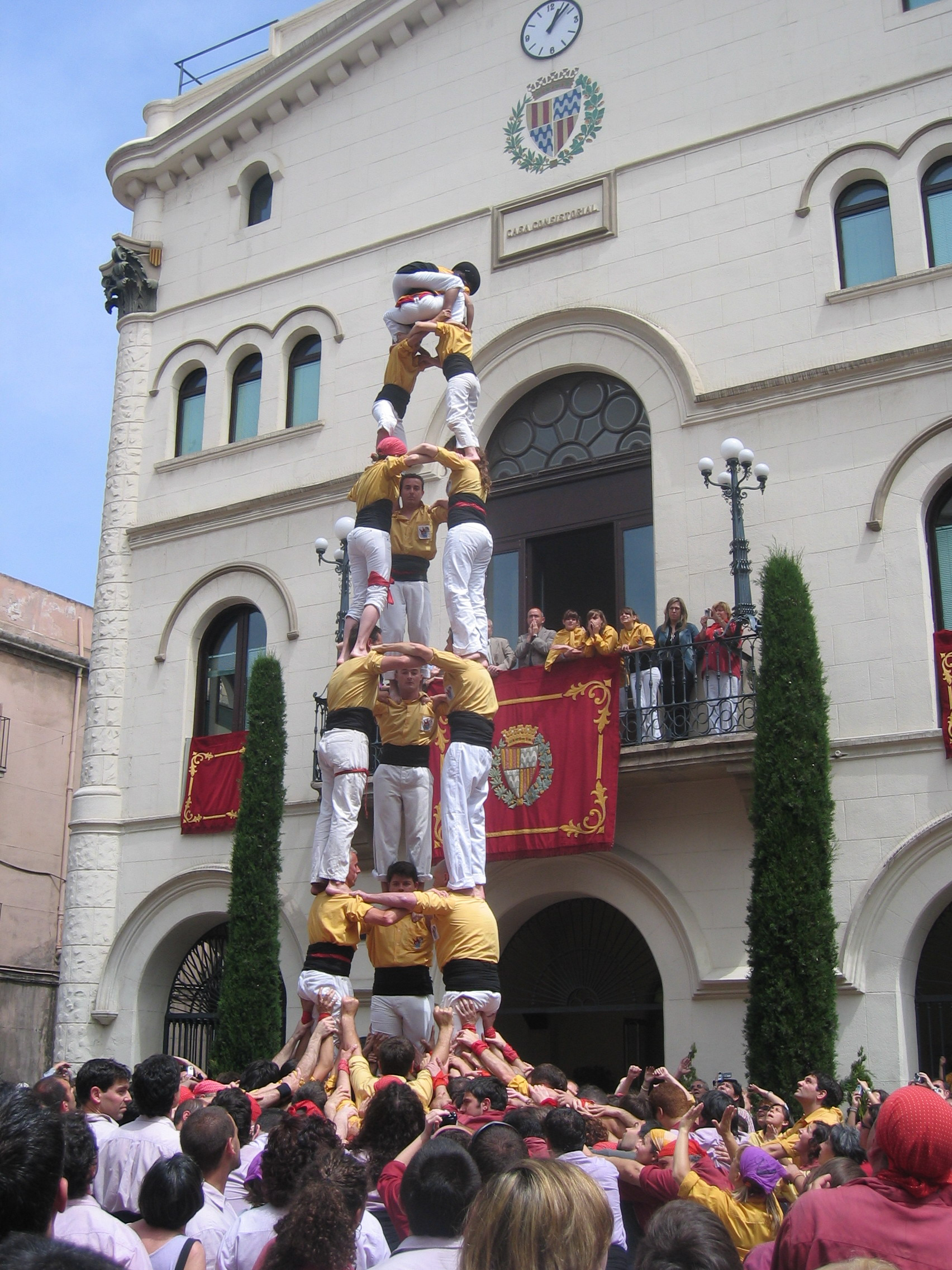 Els Castellers de Badalona a la Jornada castellera Festes de Maig 2007